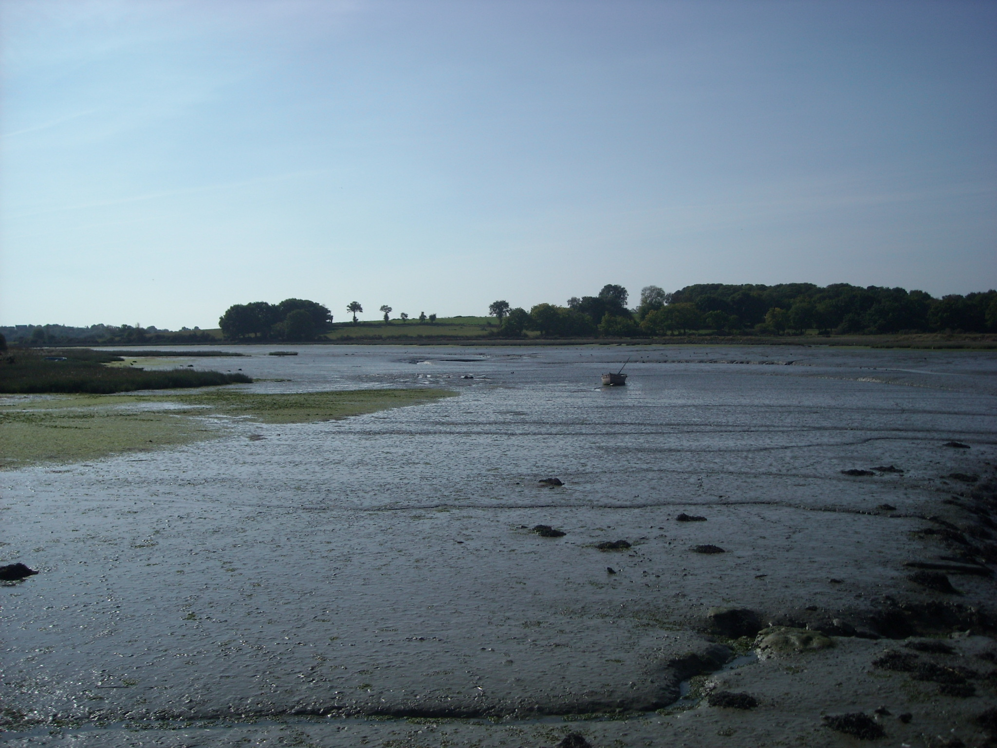 Vue depuis Cantizac.